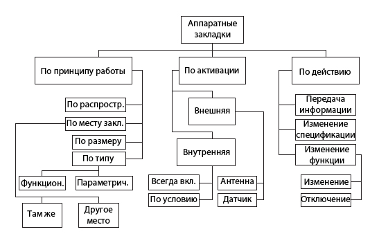 Таблица с классификацией аппаратных закладок.